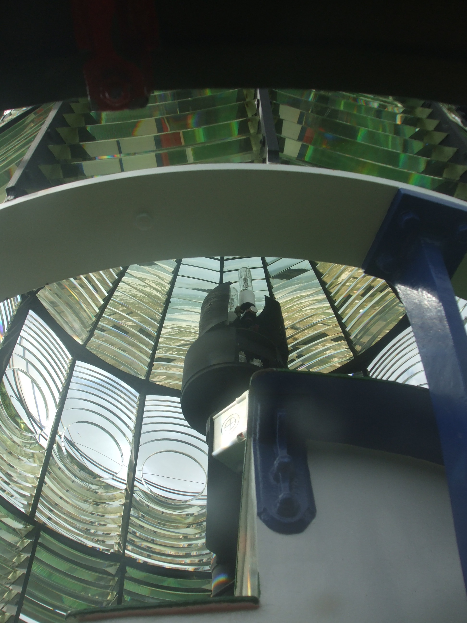 Leuchtturm auf Amrum - Innenansicht: Lichtquelle mit Fresnel-Linse